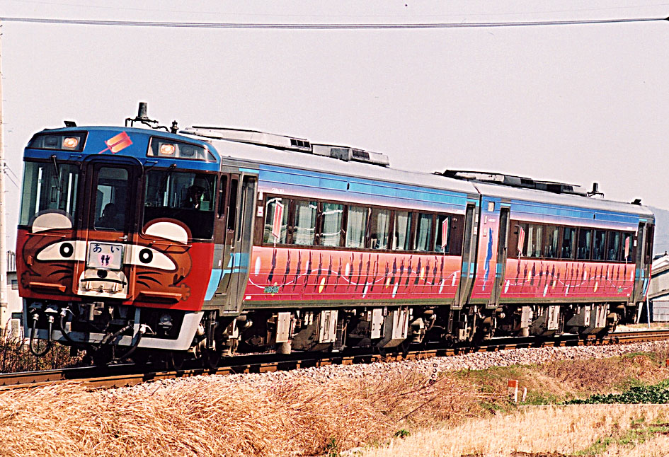 キハ185系気動車 「あい」